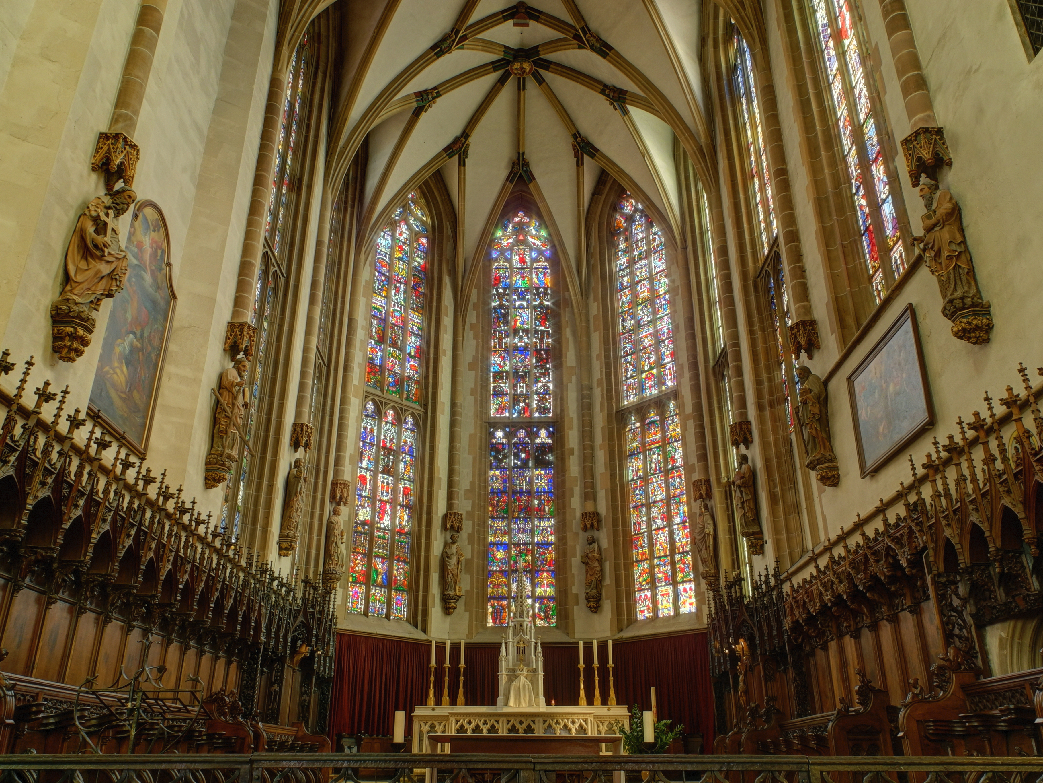 Collégiale Saint-Thiébaut de Thann, classée Monument Historique sous le n° PA00085696 (HDR).